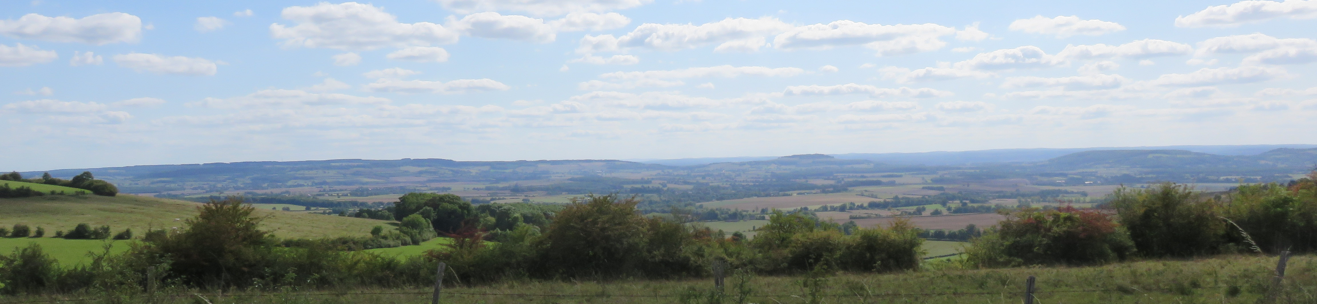 Pays d'Auxois, entre Semur et Pouilly, la ligne de crête du Morvan à l’horizon.